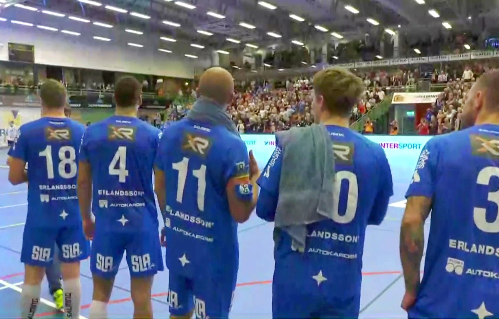 IFK Skövdes avbytarbänk